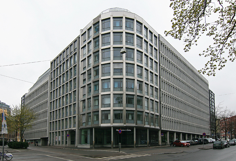 Høgskolen i Oslo, Avd. for ingeniør og samfunnsfag, Pilestredet. Edvard Storms gate til venstre.